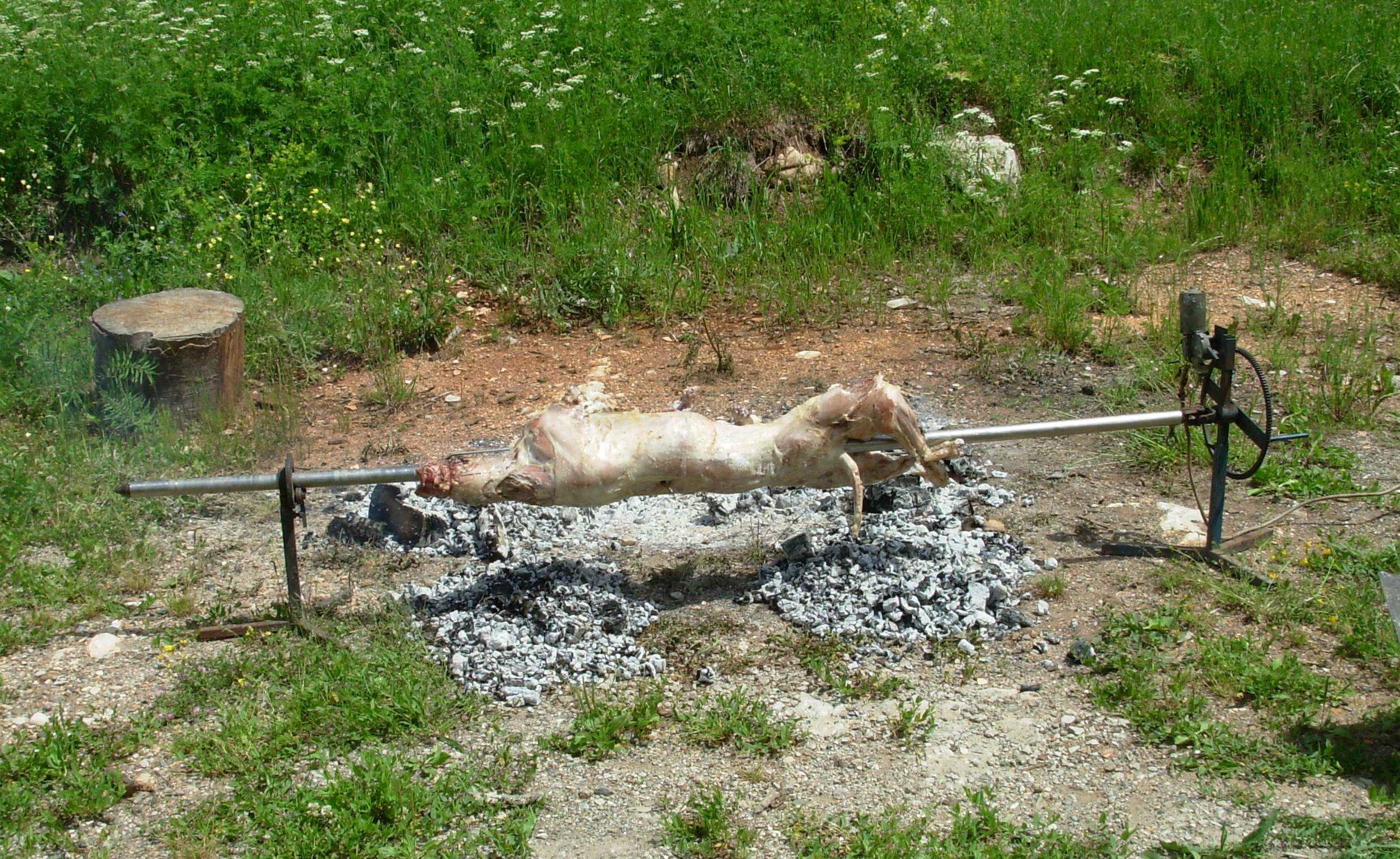 Jagnje na ražnju. Slikao Goldfinger